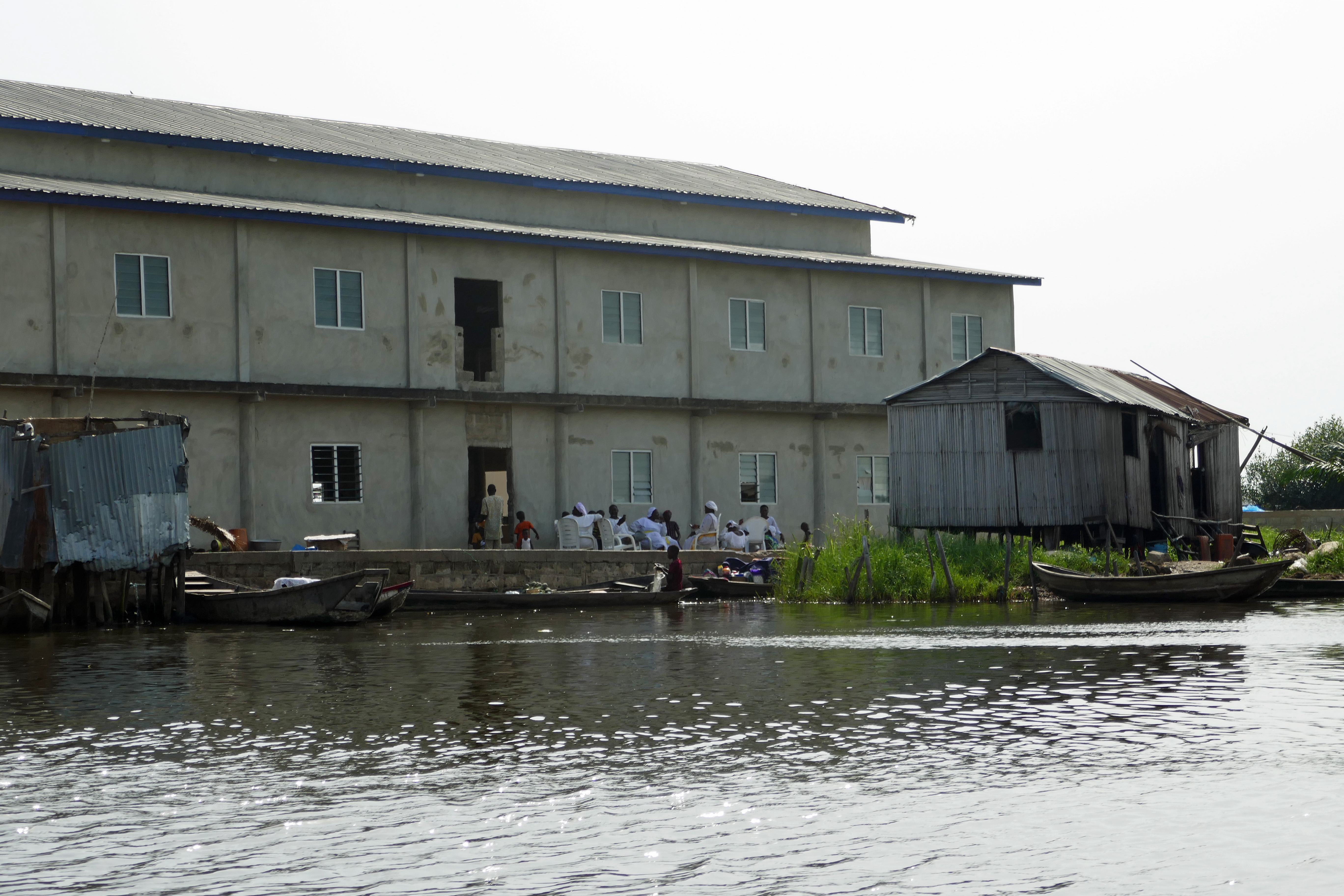 Vêtus de blancs, des adeptes de l'Eglise du Christianisme Céleste à Ganvié (Bénin).